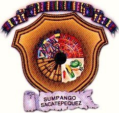 Aqui podesmos apreciar el escudo del Municipio de Sumpango, Sacatepequez. En el se puede apreciar una gran diversidad de colores los cuales representan el traje tipico de la region y los principales alimentos que se cultivan en la zona.